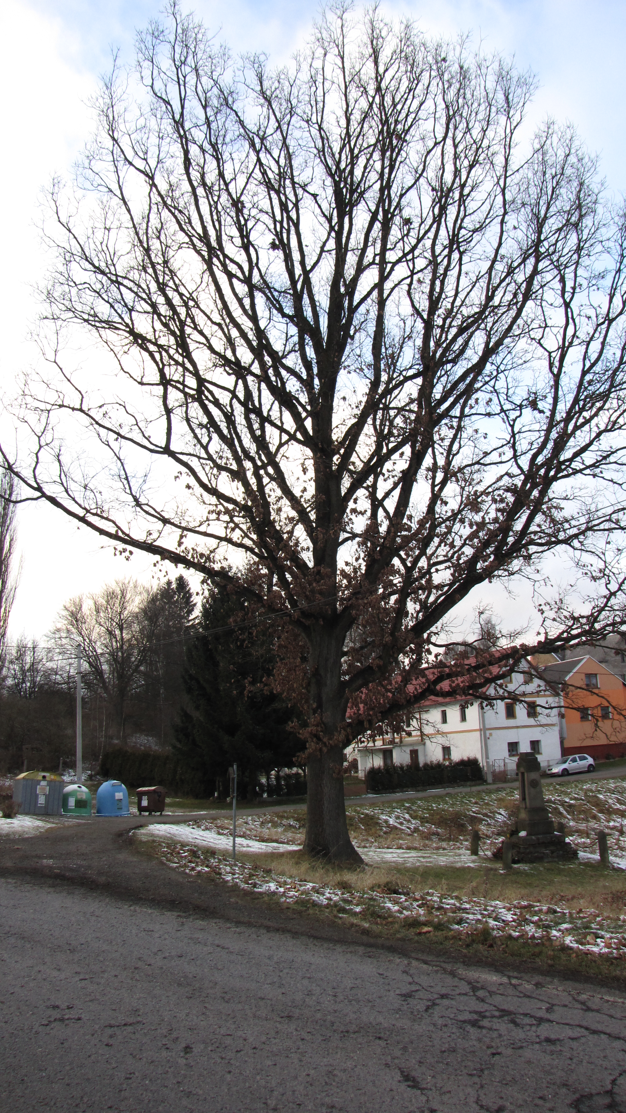 Pomník obětem 1. světové války s památným dubem.